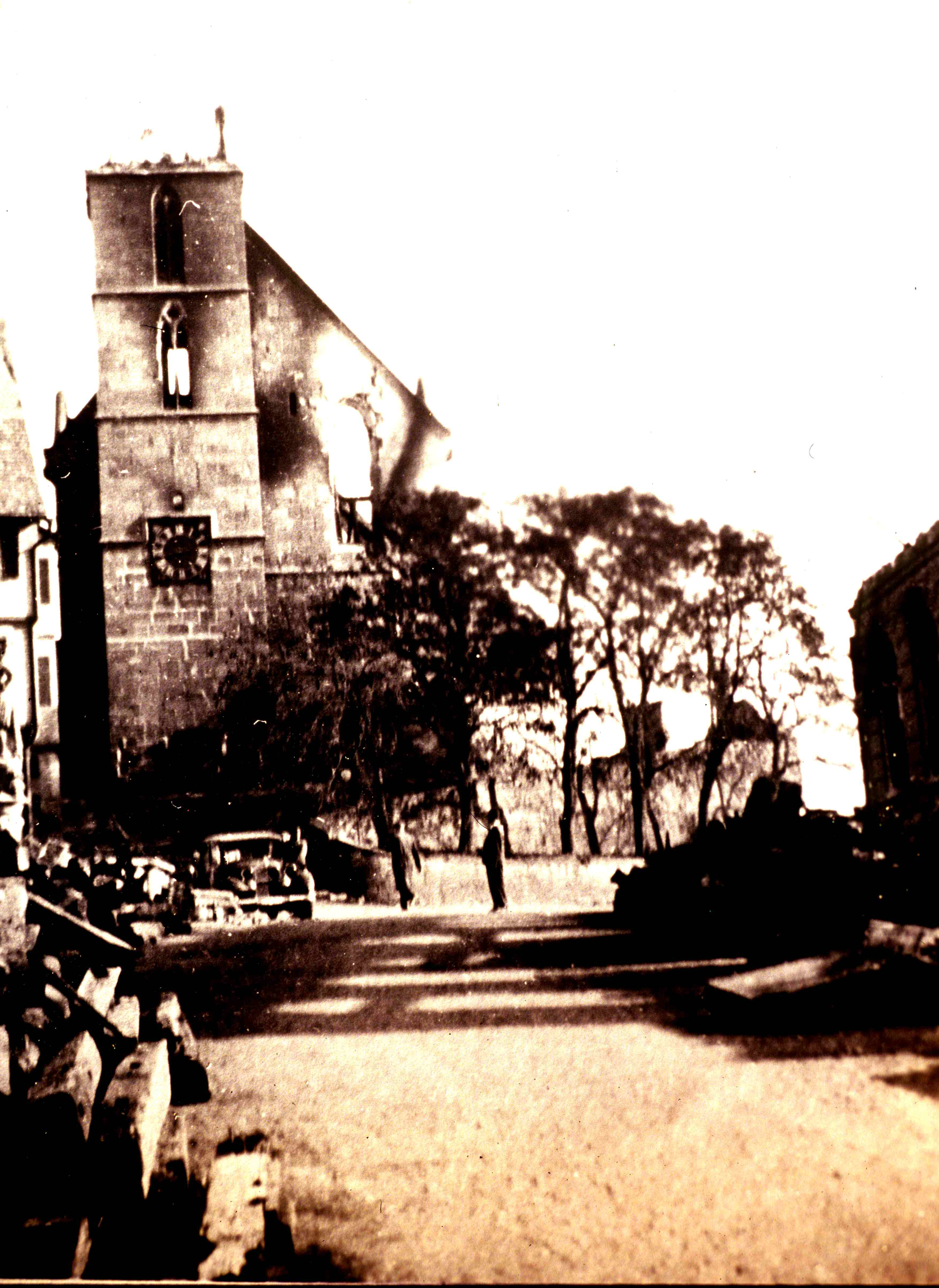 Marktplatz und ev. Stadtkirche von Böblingen nach dem Bombenangriff vom 7./8. Oktober 1943